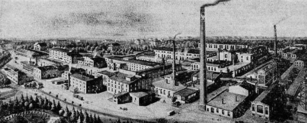 Widok zakładów papierniczych w Zakrzowie rok 1900.